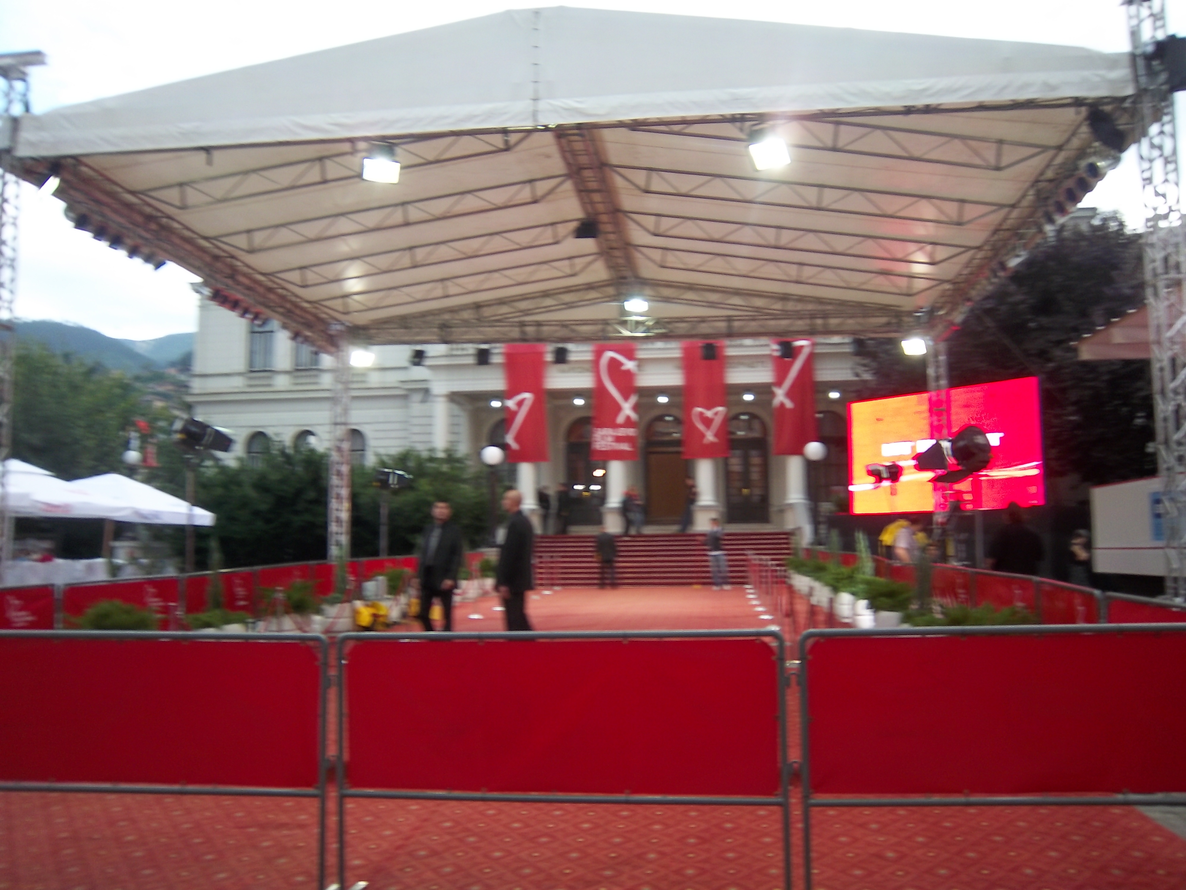 Црвени тепих Сарајево филм фестивала 2011. испред народног позоришта.-Crveni tepih Sarajevo film festivala 2011. ispred narodnog pozorištaBosanski: Crveni tepih Sarajevo film festivala 2011. ispred narodnog pozorišta-Црвени тепих Сарајево филм фестивала 2011. испред народног позоришта.